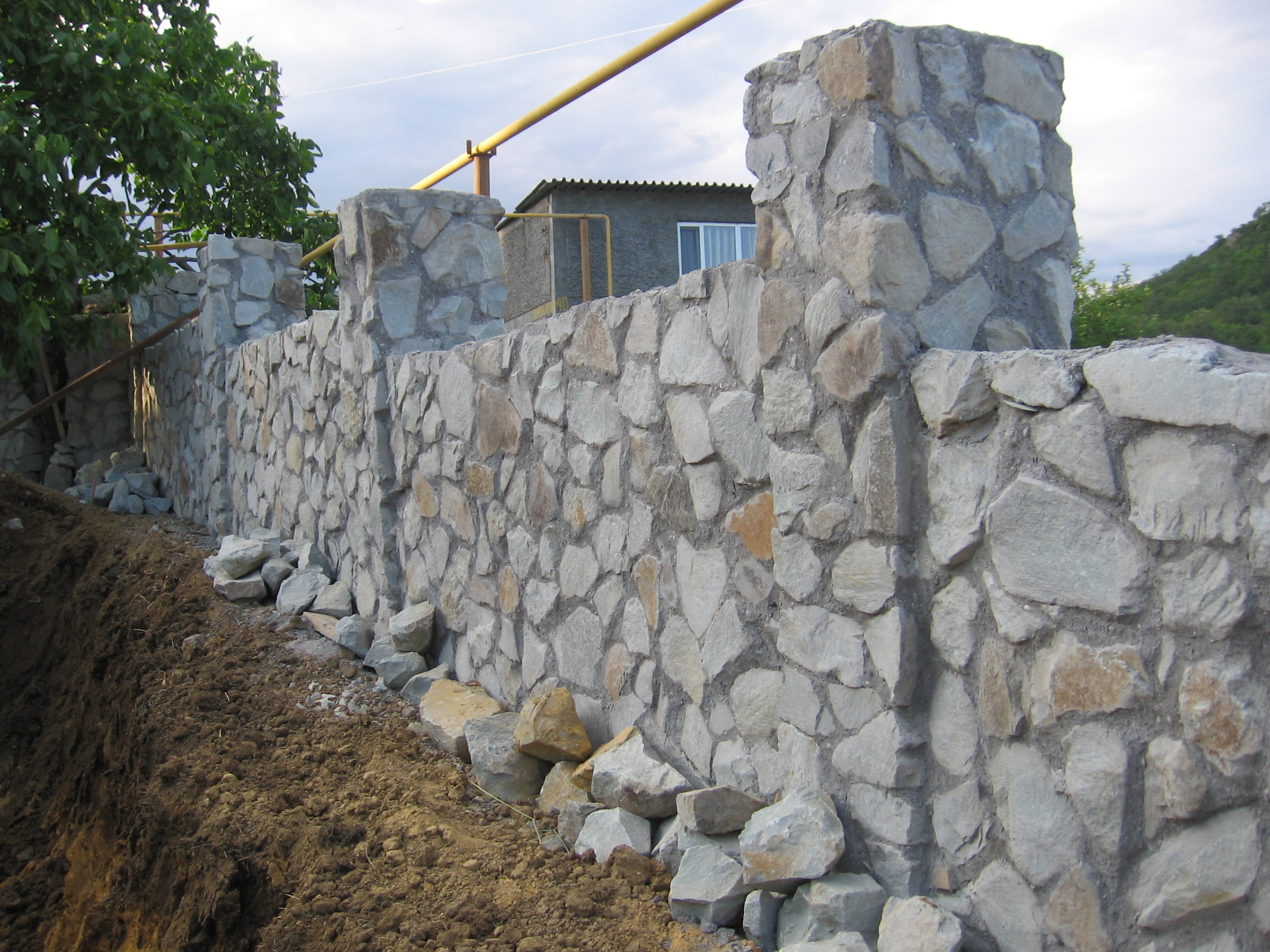 Мур